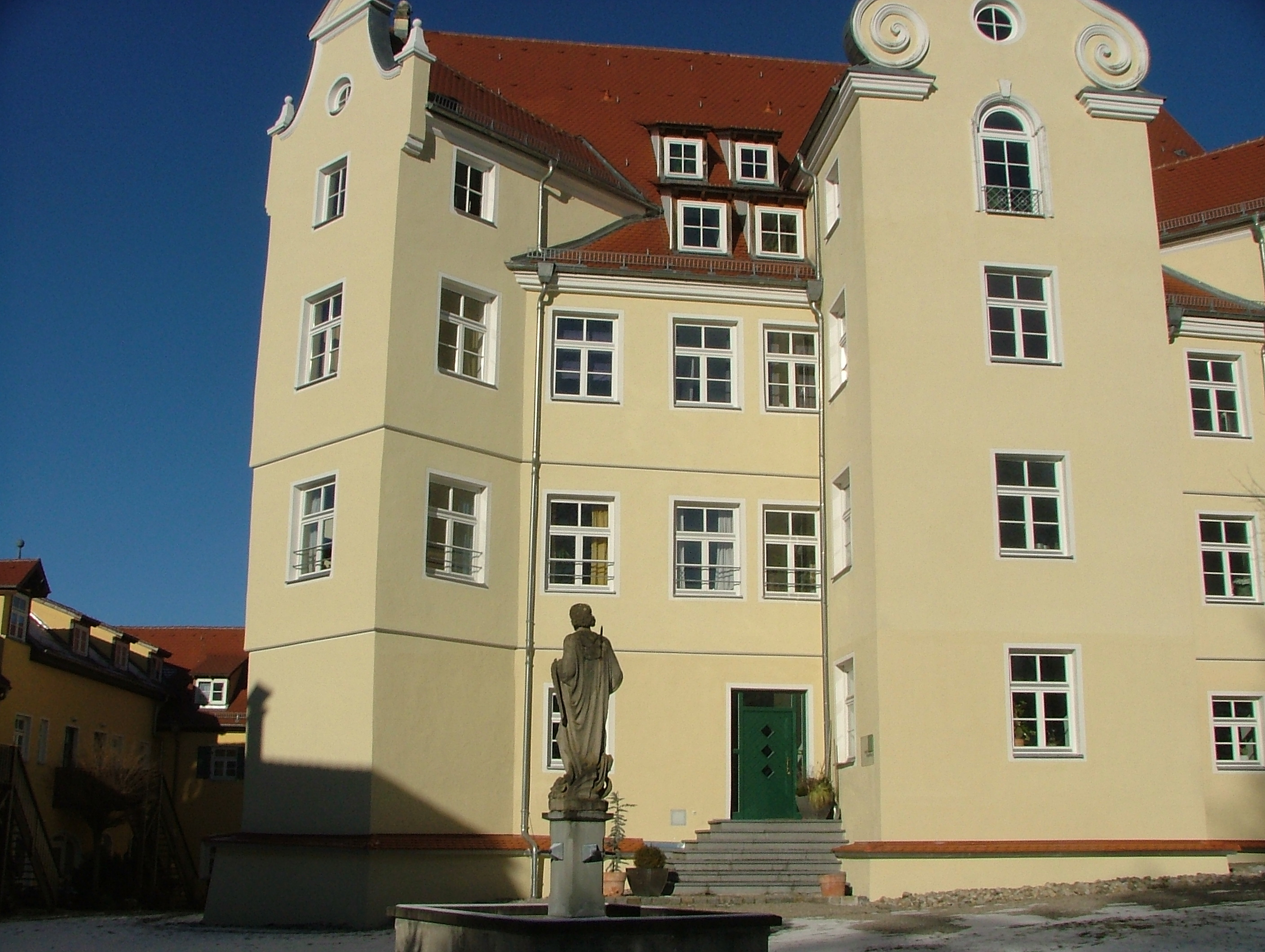 Erolzheim